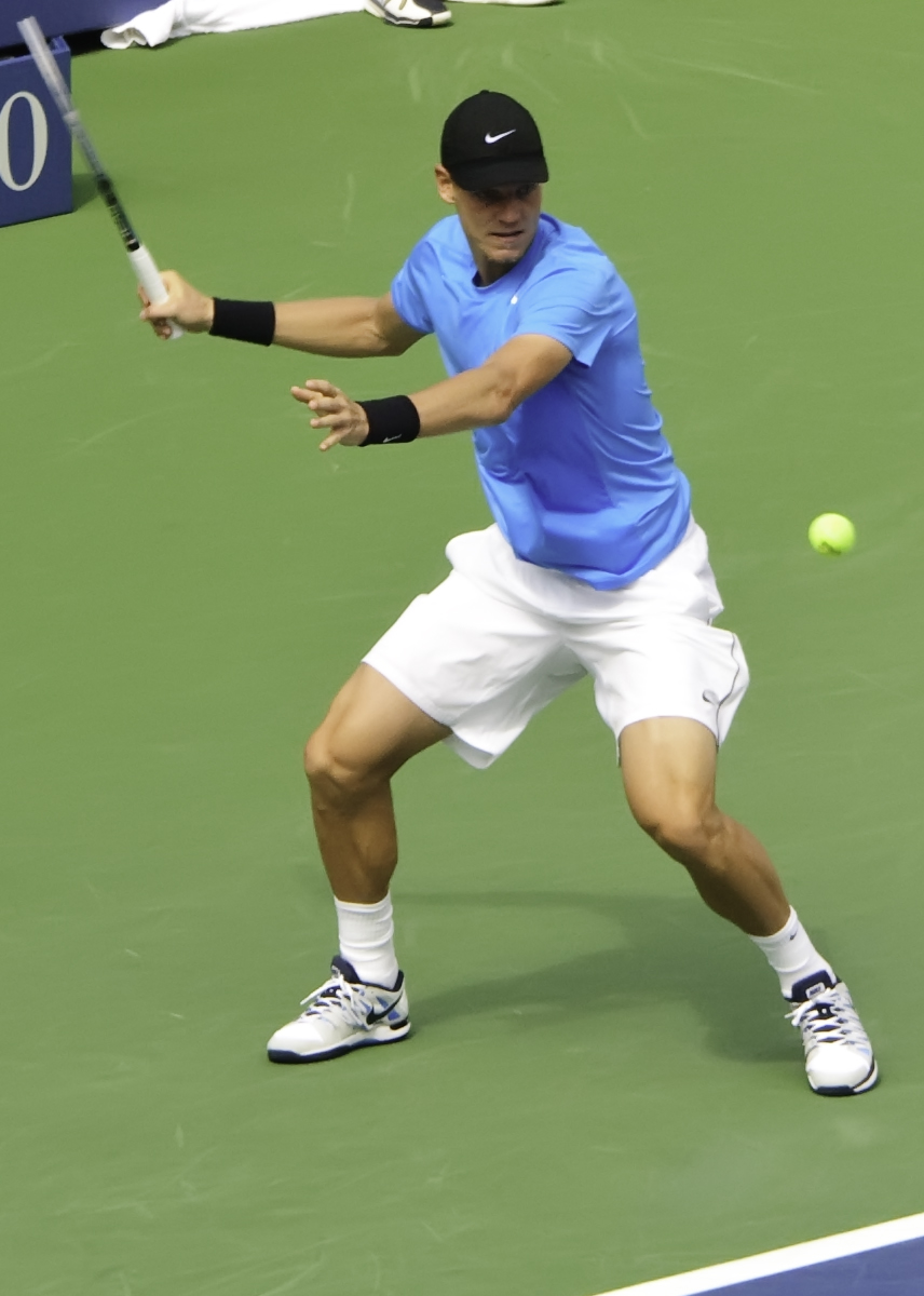 Tomáš Berdych à l'US Open en 2012.